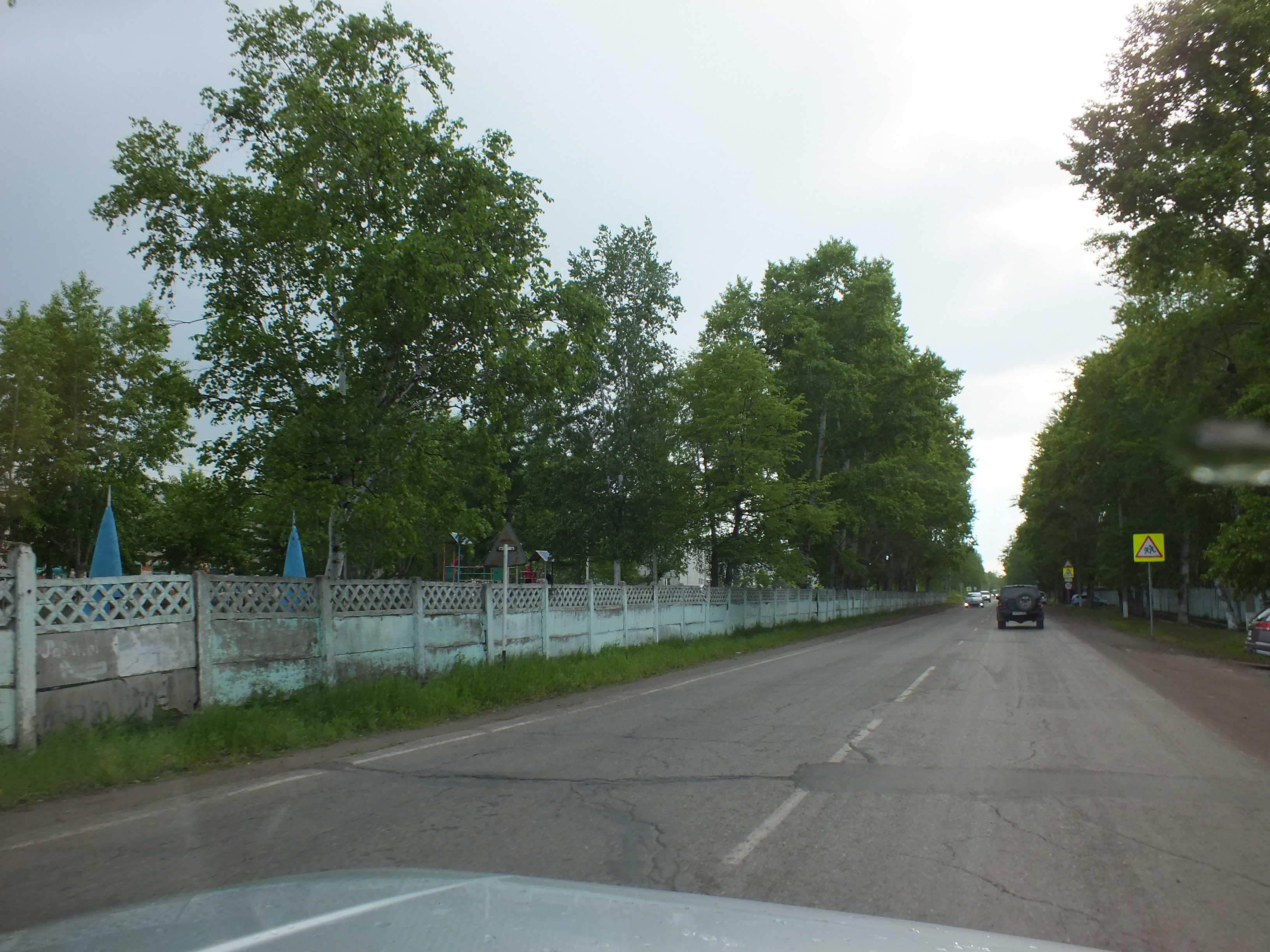 Аэропорт Хурба Комсомольский район